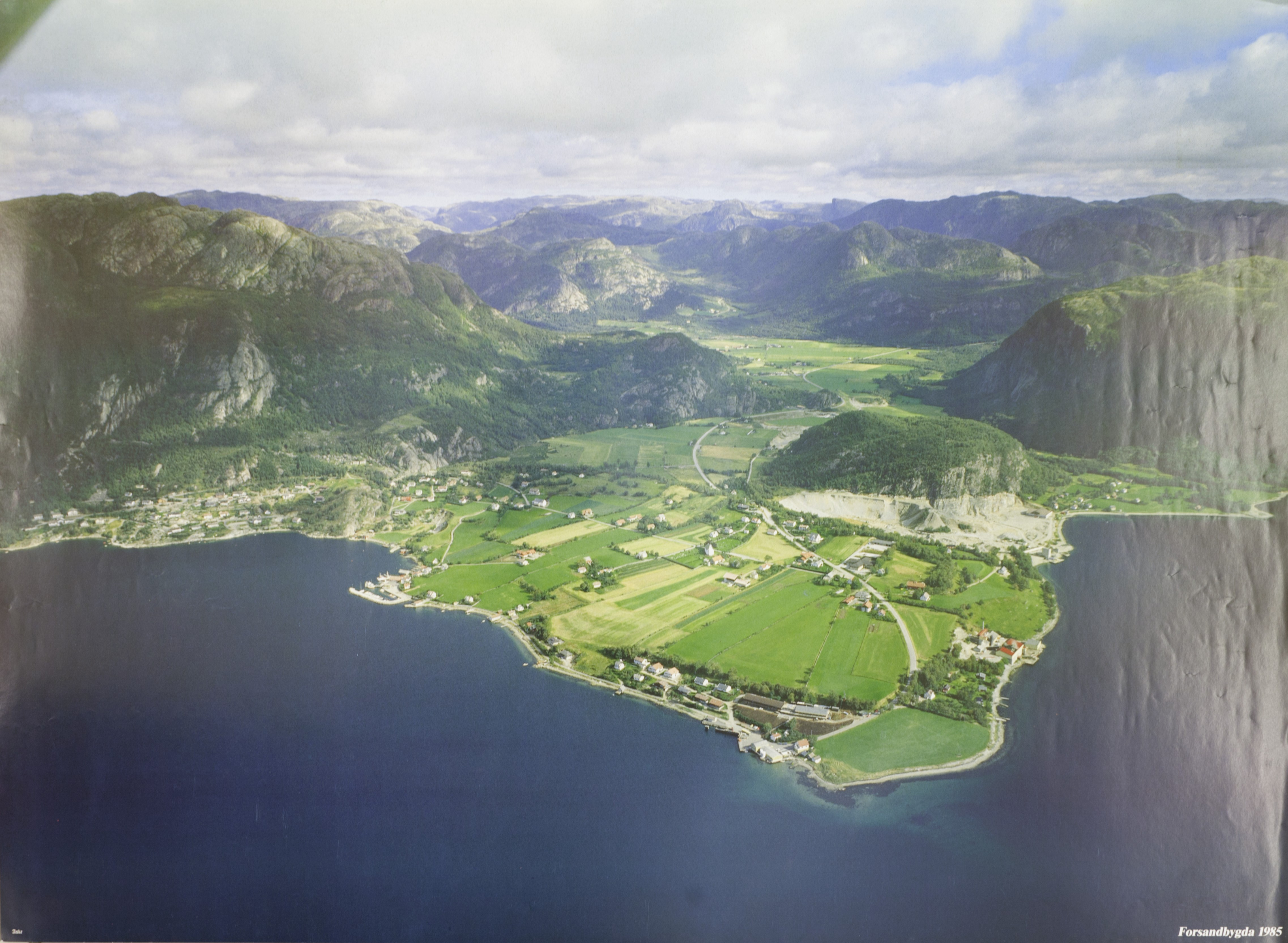 Forsand er med rundt 1100 innbyggere en av de minste kommunene i Rogaland målt i folketall, men arealmessig er bare Suldal og Hjelmeland større. Forsand-bygda befinner seg i krysset mellom to større fjorder: Lysefjorden, som går 42 km østover, og Høgsfjorden som går sørover rundt halve denne lengden.